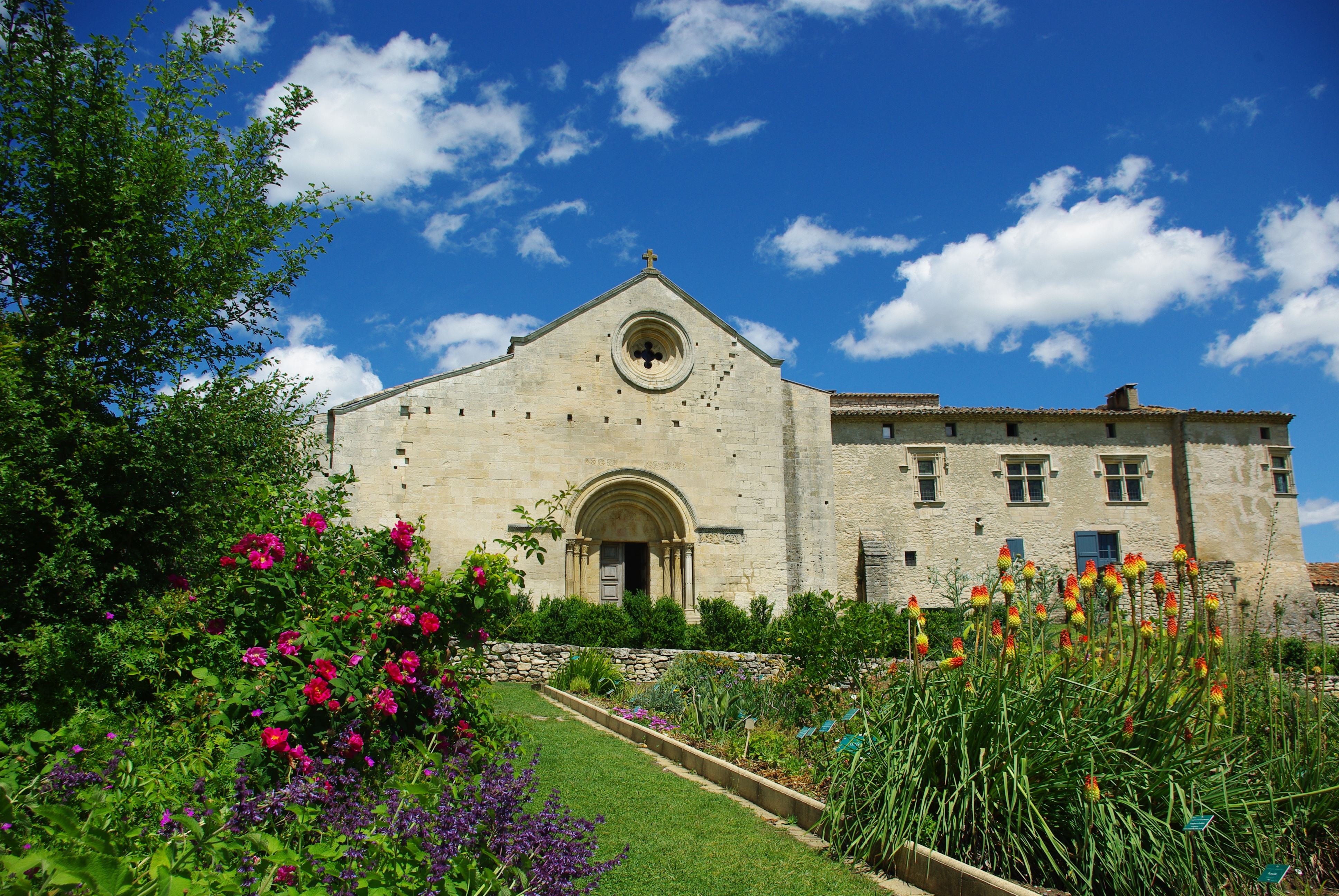 Le musée de Salagon - vue sur l'église